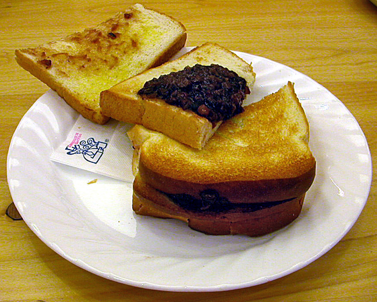 撮影者：小太刀 小倉トースト。中身が分かるように一番上のパンをめくって撮影しました。